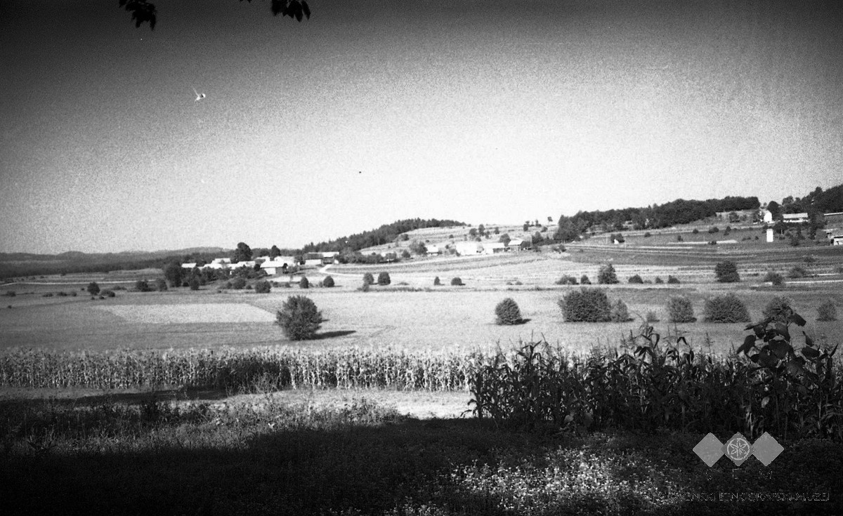 Mala vas pri Št. Jurju.